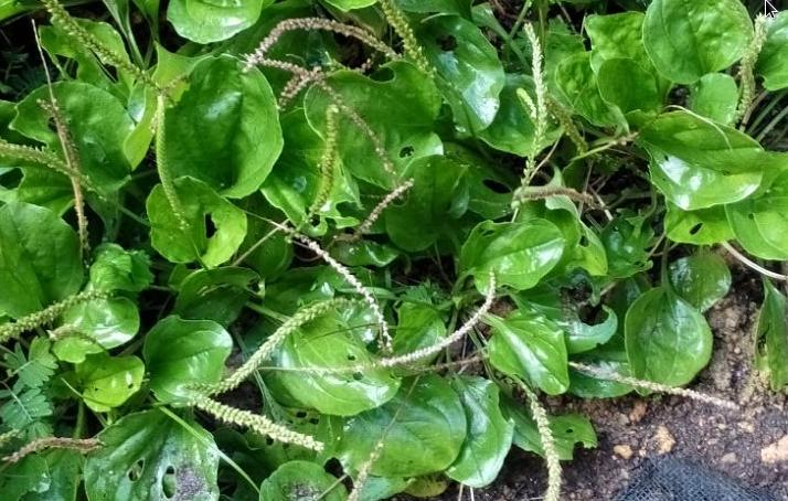 Singapura Pokok daun senduk